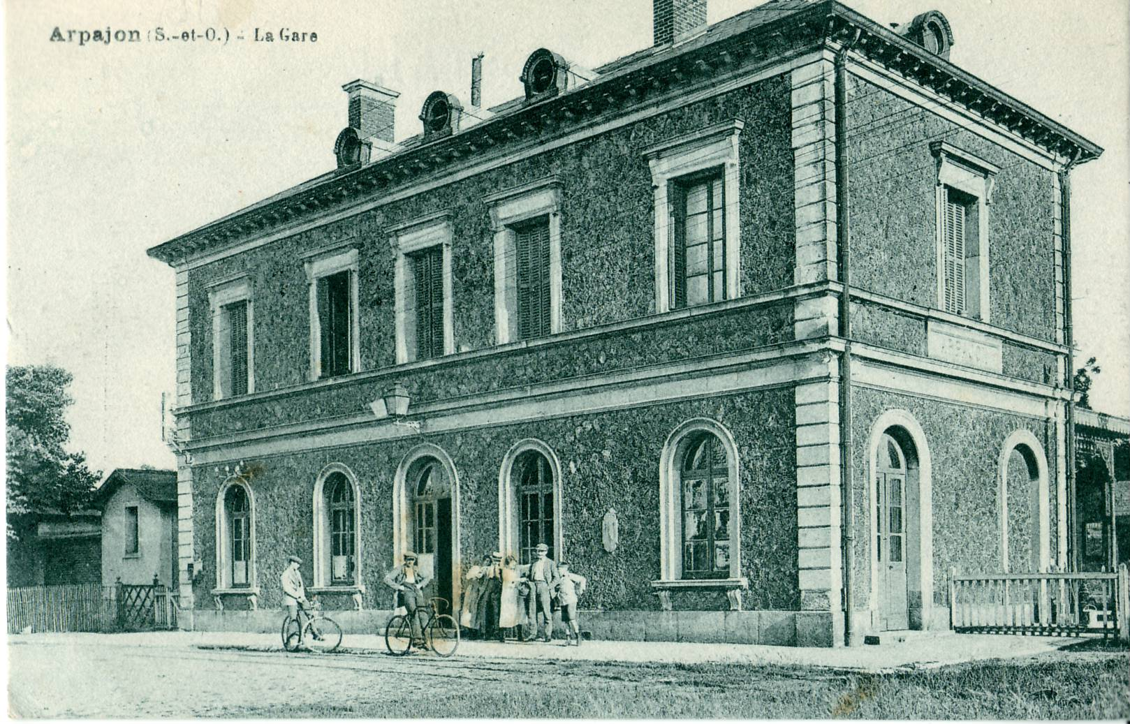 Carte postale ancienne éditée par Deflers : ARPAJON : la Gare